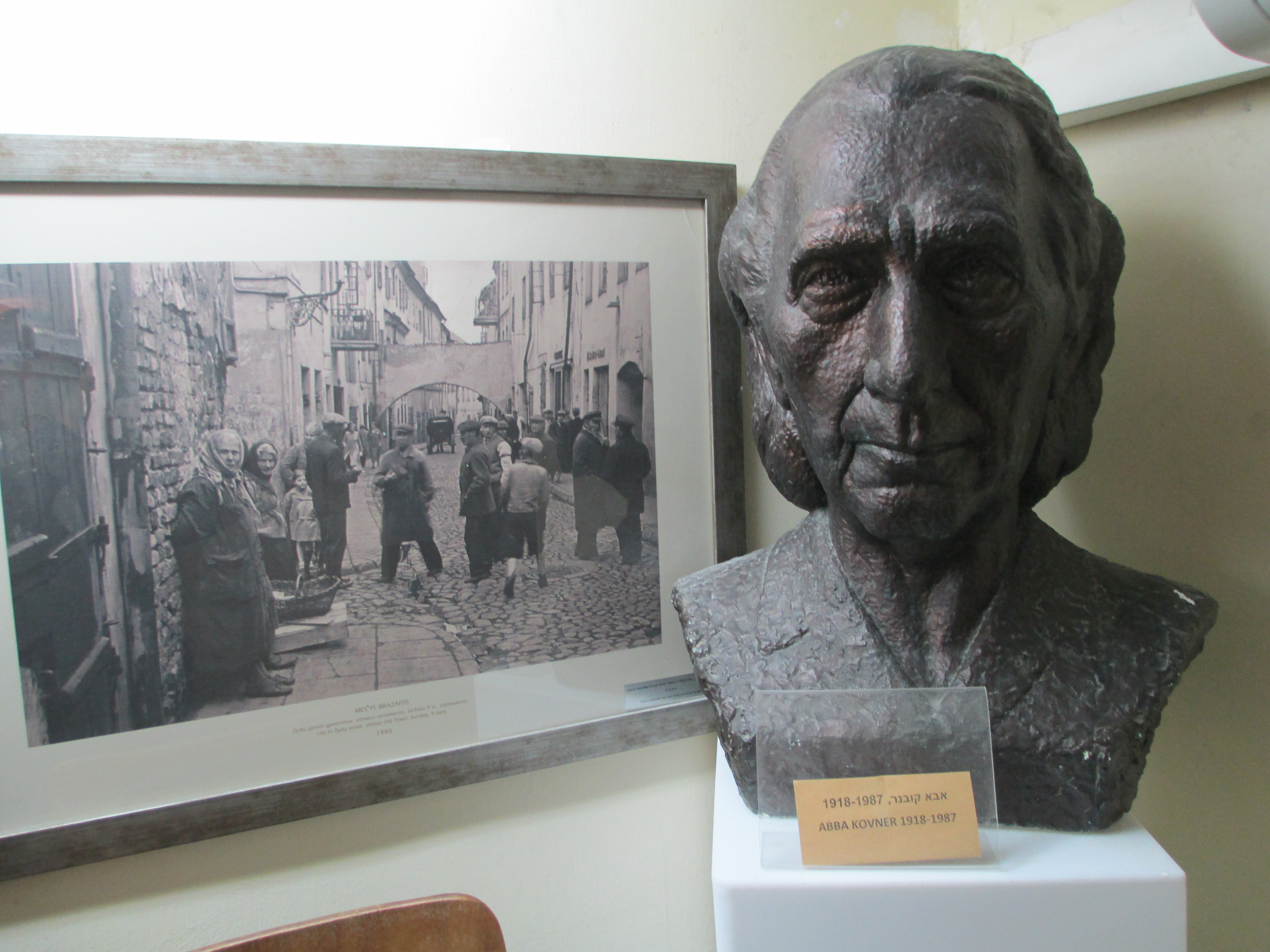 פסל אבא קובנר בבית וילנה בתל אביב על רקע תמונה של גטו וילנה